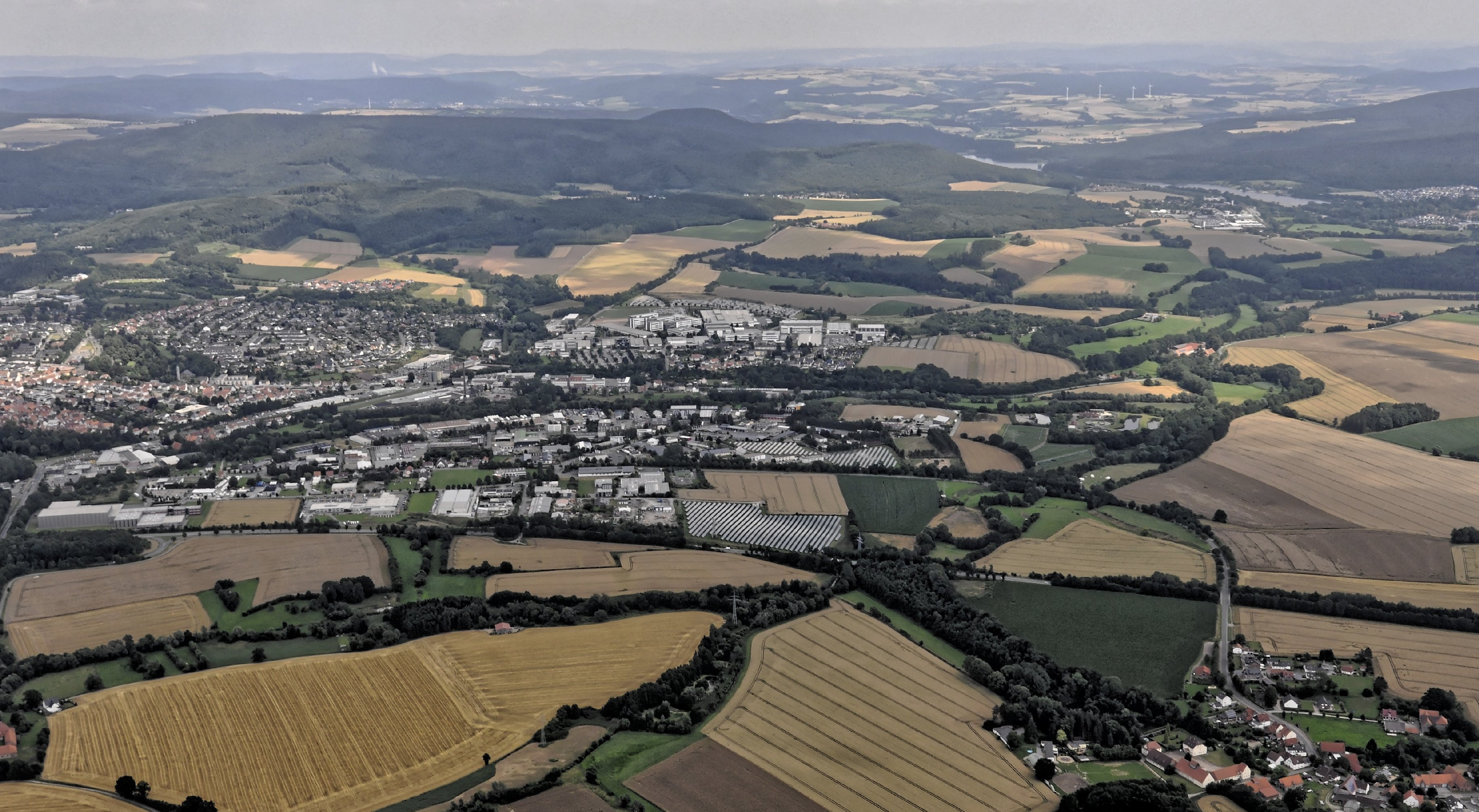 Bilder vom Flug Nordholz-Hammelburg 2015: Blomberg